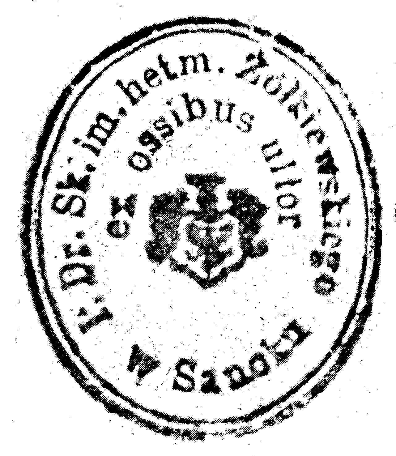 I Drużyna Skautów im. hetmana Stanisława Żółkiewskiego w Sanoku – Ex ossibus ultor